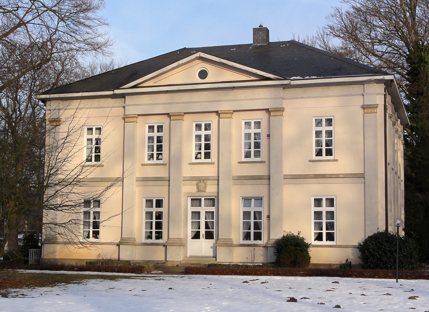 Egestorff-Stiftung in Bremen: Gutshaus (um 1875), Südseite mit Wappen Oelrichs Das abgebildete Objekt ist ein geschütztes Kulturdenkmal in der Freien Hansestadt Bremen, mit der Nr. 1724 beim Landesamt für Denkmalpflege registriert.